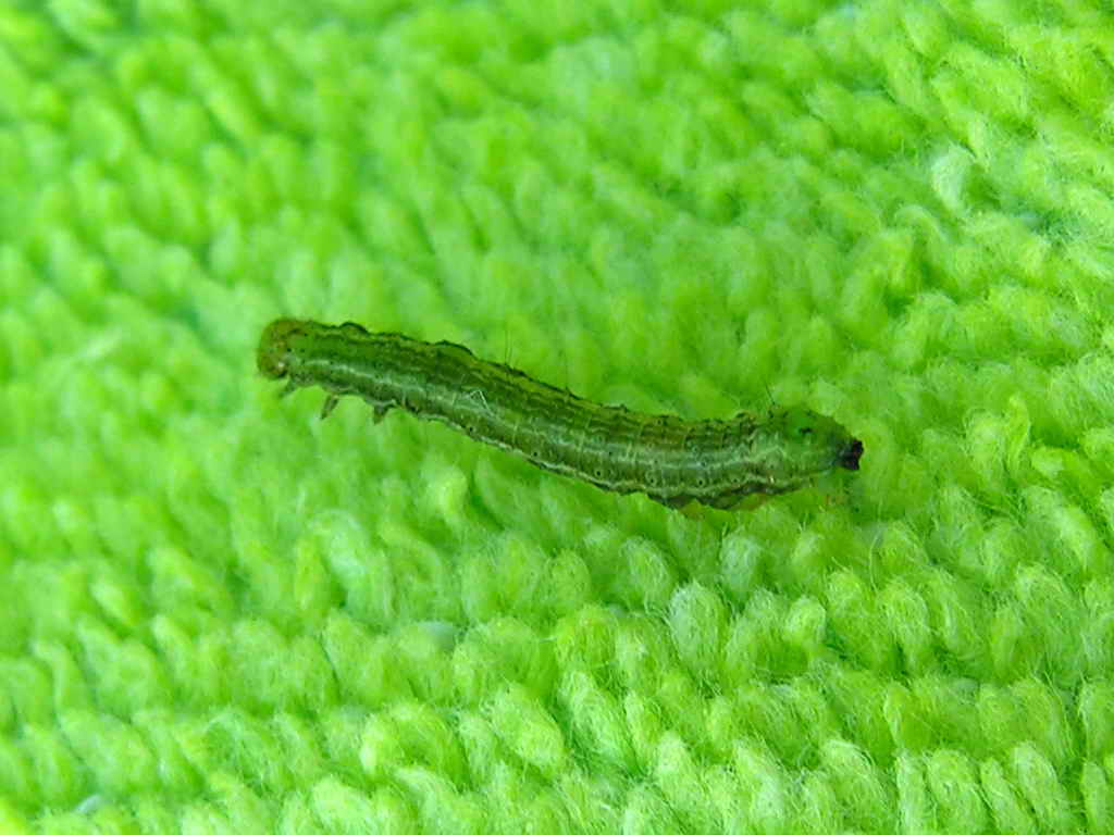 Foto tirada cunha Nikon E8800 Boiro - Galicia - Spain